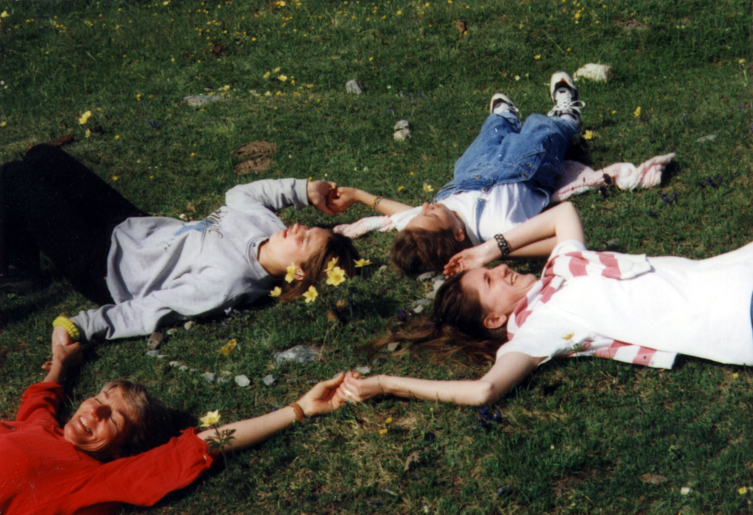 La maitresse et quelques élèves apprécie leur course d’école. Image tirée du film « Classe d’accueil » de Fernand Melgar.